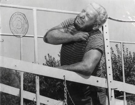 escena de la pelicula el hombre invisible ataca (1967) con Martín Karadagián